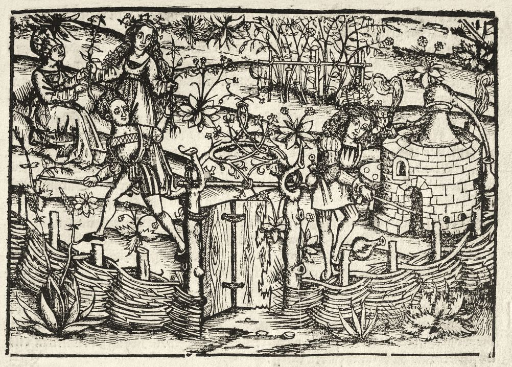 Frontispice de Das distilierbuch 1521Jardin des plantes. Récolte des plantes médicinales et distillation.